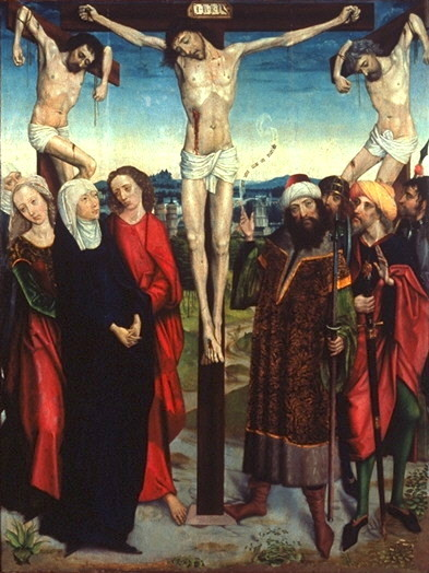 Triptyque avec Crucifixion Panneau central